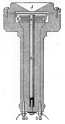 Motiv: Bells Fernsprecher (Querschnitt) Bearbeitung: Agon S. Buchholz (asb)